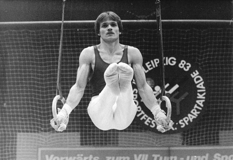 Frank Bourchard ADN-ZB Gahlbeck 18.12.82-erd-Leipzig: DDR-Meisterschaften im Turnen (16. -19.12.) Im Mehrkampf der Männer führt nach der Pflicht der Leipziger Frank Bourchard (SC DHfK) mit 56,55 Punkten.